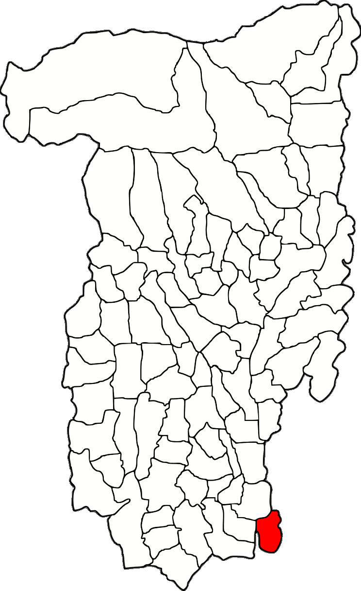 Lage der Gemeinde Voicești im Kreis Vâlcea (RO).